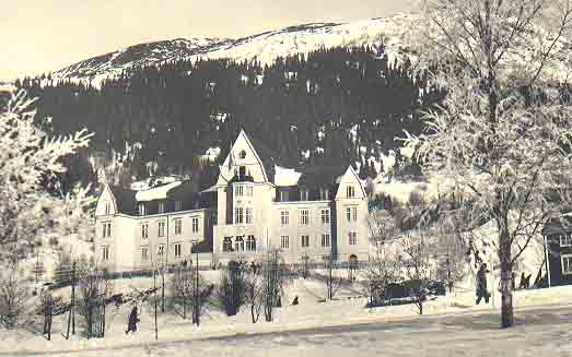 Sporthotellet, Åre. Byggnadsår 1911-12. Arkitekt Per Benson